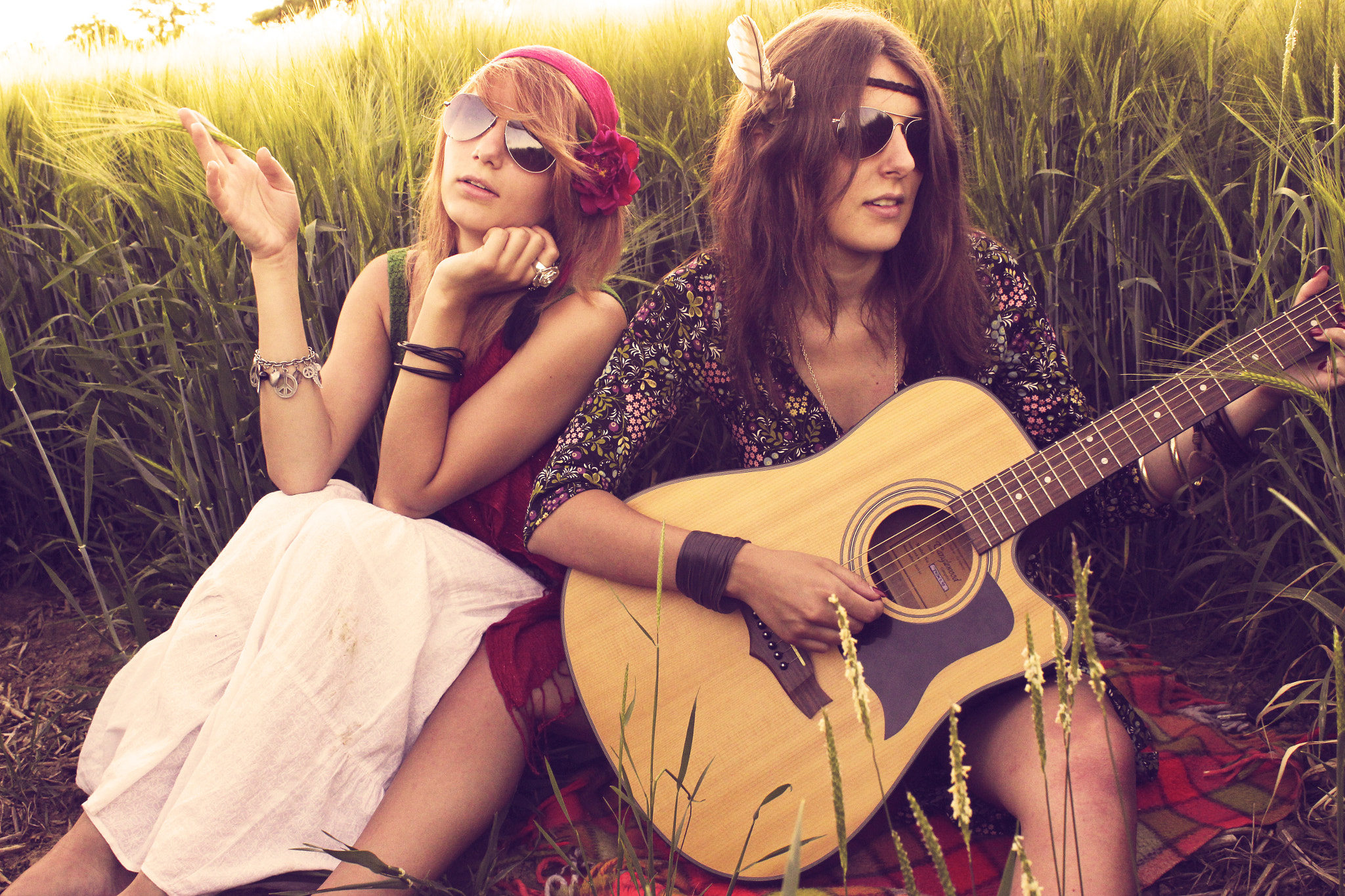 500px provided description: Hippie Sister [#girl ,#sunset ,#flower ,#grass ,#woman ,#life ,#love ,#happy ,#fun ,#live ,#peace ,#women ,#sisters ,#hippie ,#hippy ,#blume ,#frau ,#frauen ,#liebe ,#m?dchen ,#sonnenuntergang ,#wiese ,#freunde ,#spa? ,#weide ,#schwester ,#woodstock ,#sisterhood ,#freundlich ,#lebe ,#schwestern ,#wiede ,#lache ,#hippie-leben ,#Hippieleben ,#Hippie-leben]